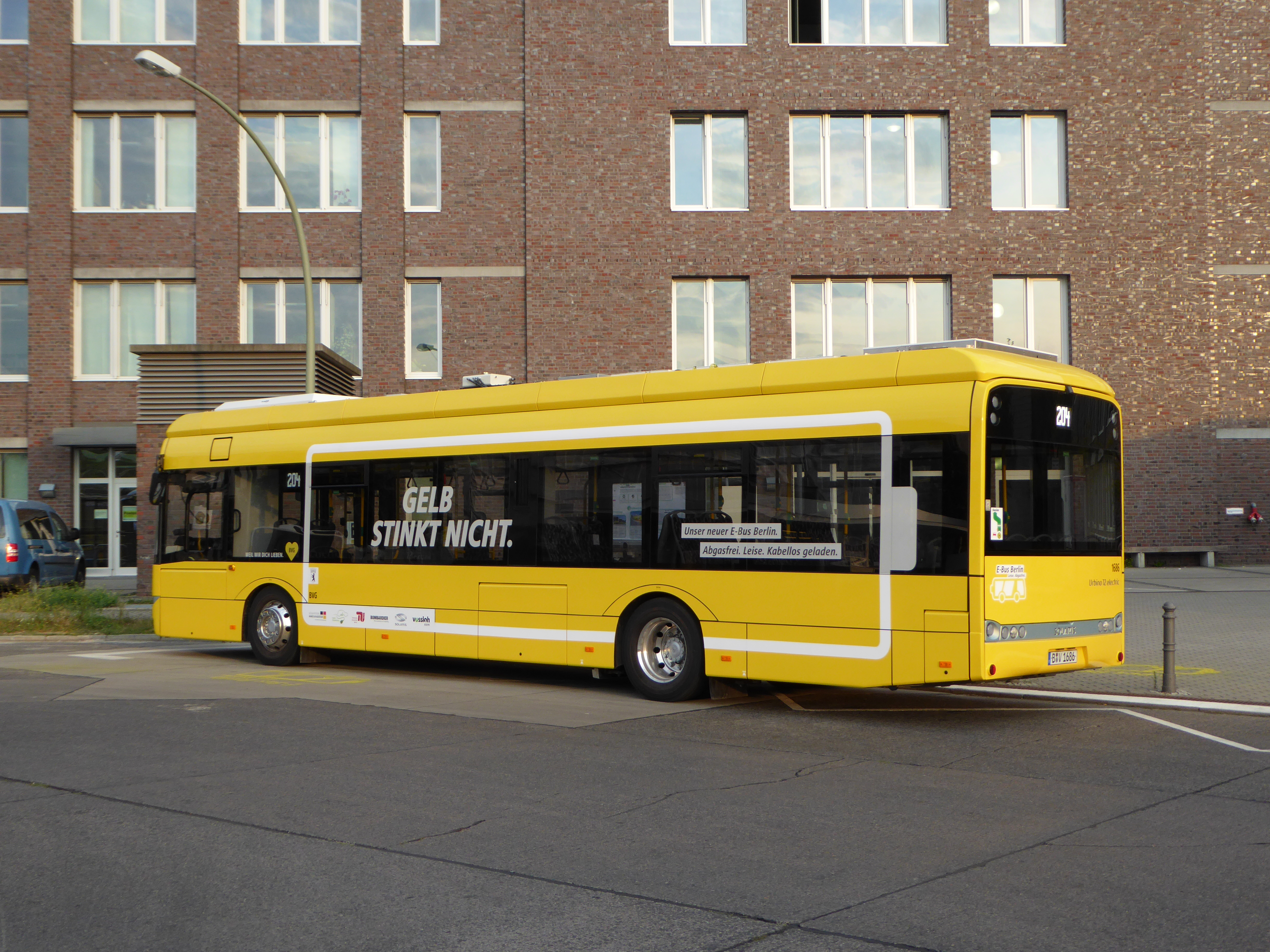 seit 31. August 2015: vier Elektrobusse im Linieneinsatz (Linie 204) auf 6 Kilometer langer Strecke: der Berliner Verkehrsbetriebe (BVG): Elektrobus: Solaris EN15 Urbino 12 electric mit dem induktiven Primove Ladesystem von Bombardier und Traktionsausrüstung von Vossloh Kiepe, die Aufladung erfolgt an den Endhaltestellen